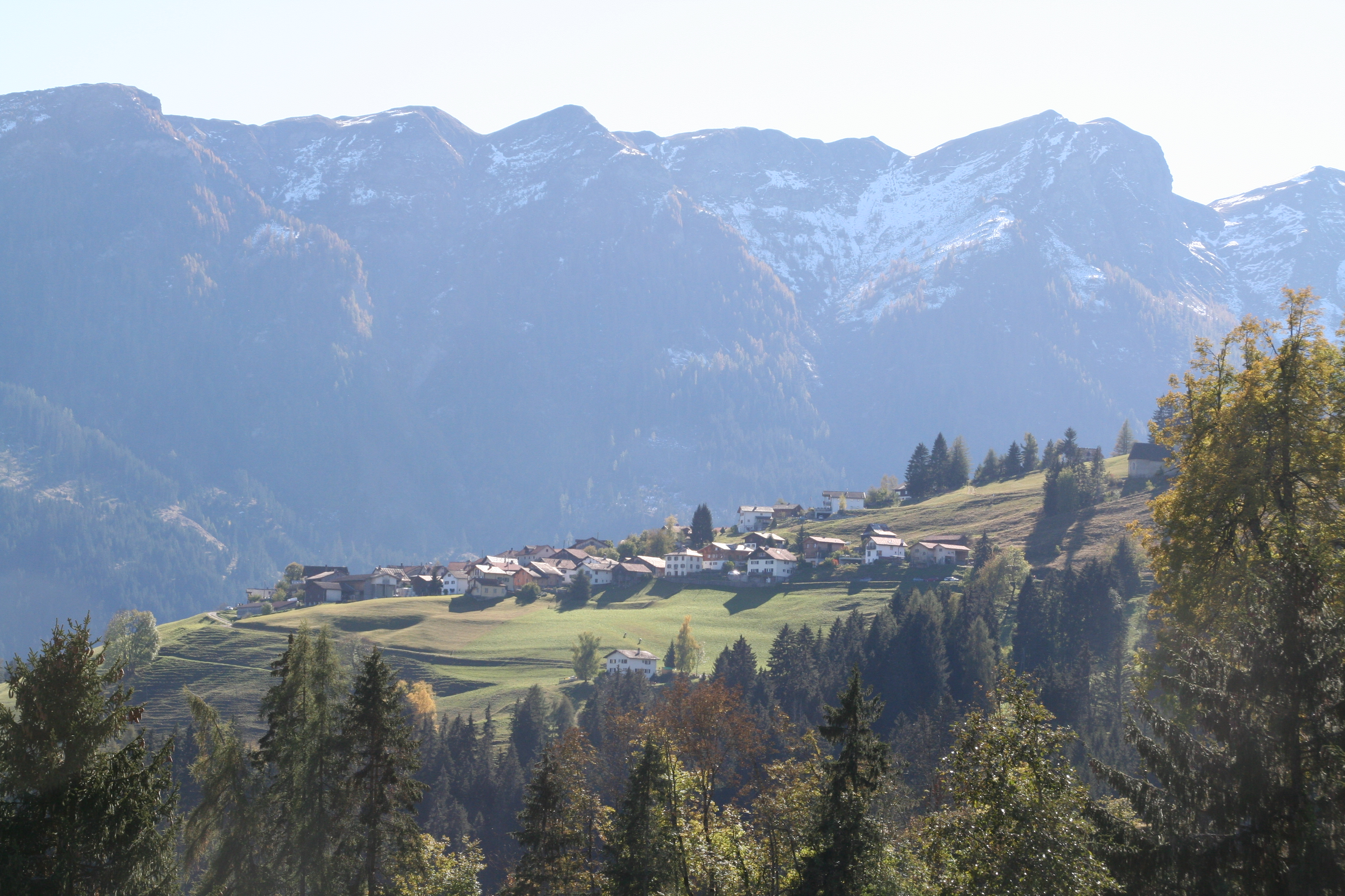 Portein, Ansicht von Norden